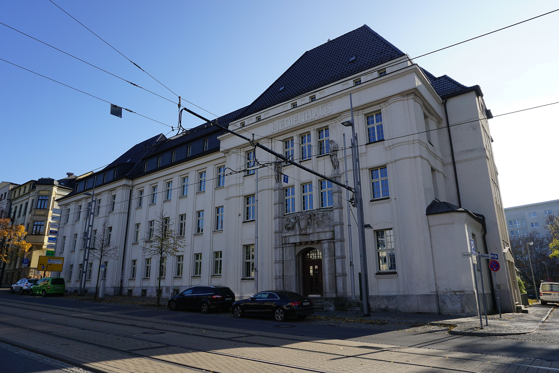 Das Medienhaus an der Carolastraße in Chemnitz 2015